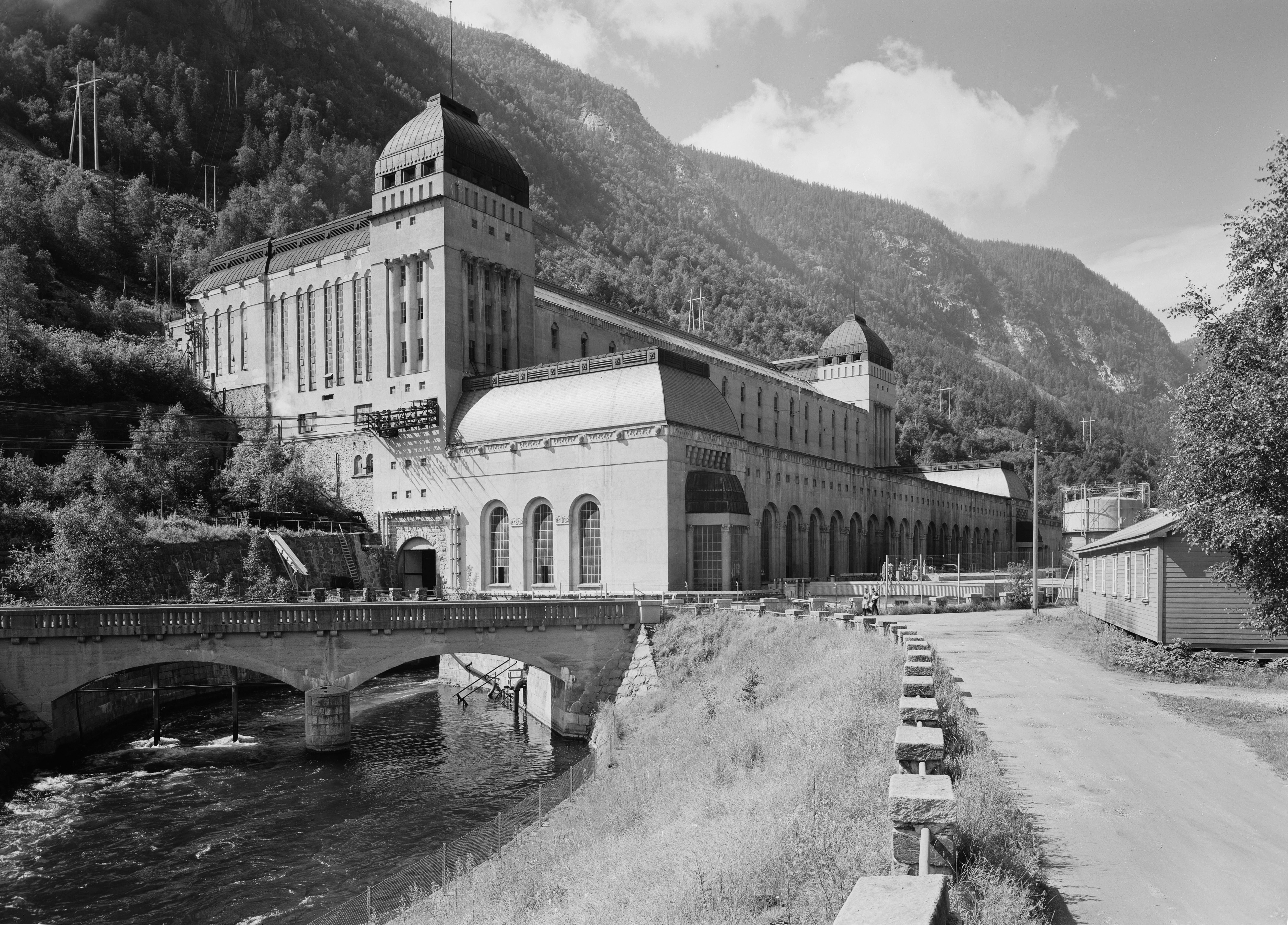 Bildet er hentet fra Nasjonalbibliotekets bildesamling Rjukan,Såheim,Vestfjorddalen, Tinn, Telemark